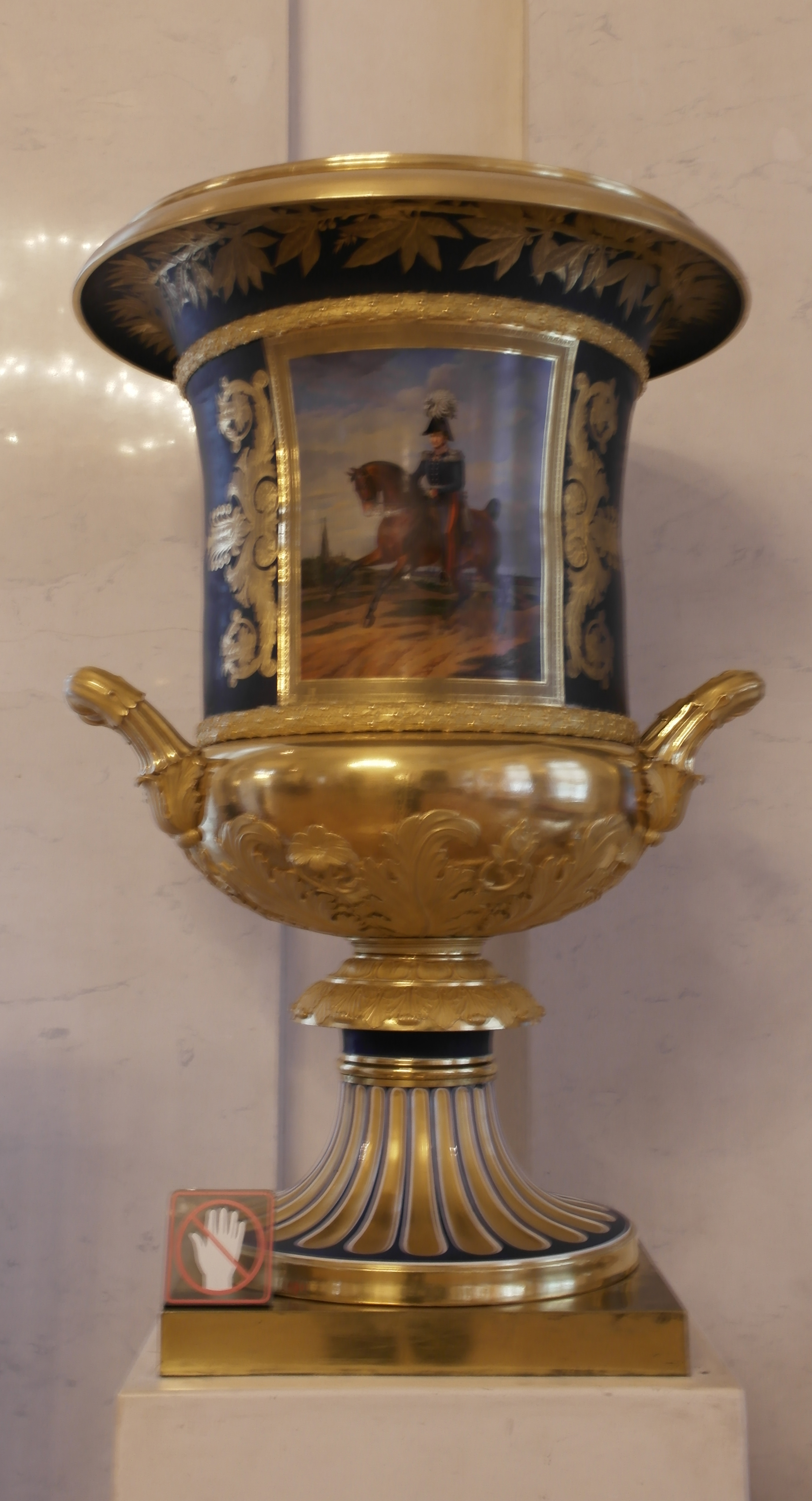 Ваза в форме кратера с изображением Фридриха Вильгельма II верхом (по оригиналу Франца Крюгера)